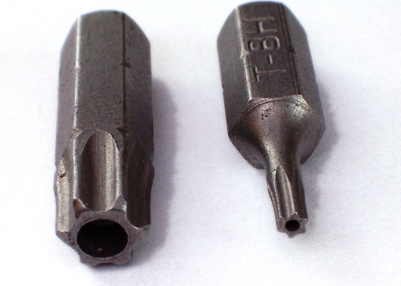 Grot wkrętaka typu Torx